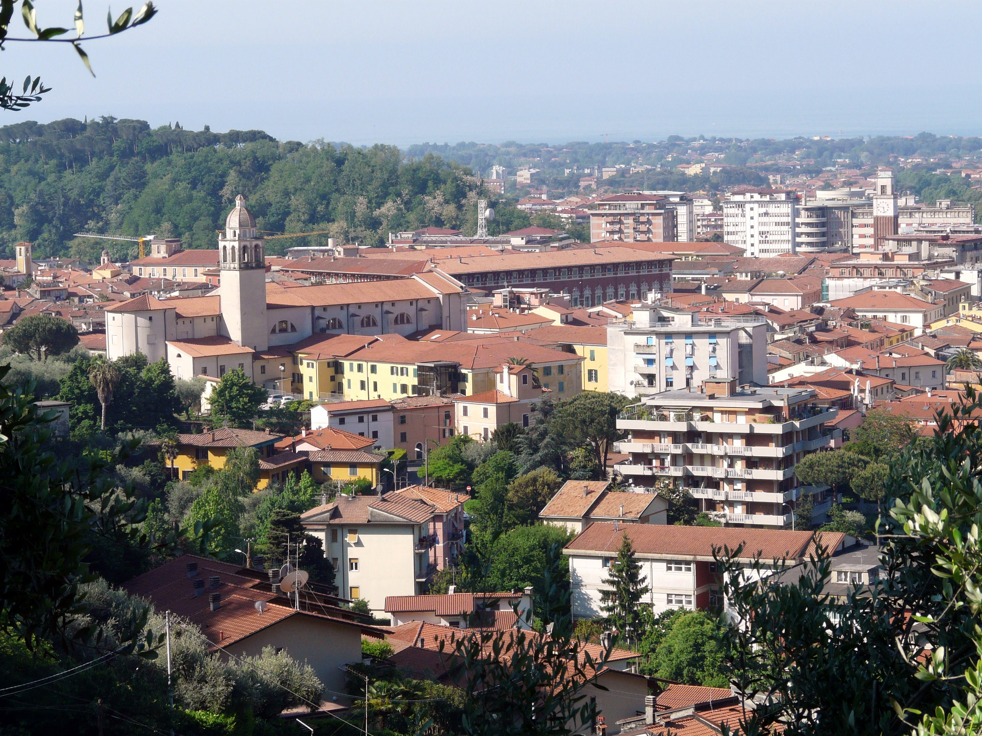 Panorama della città e del territorio comunale di Massa, Toscana, Italia